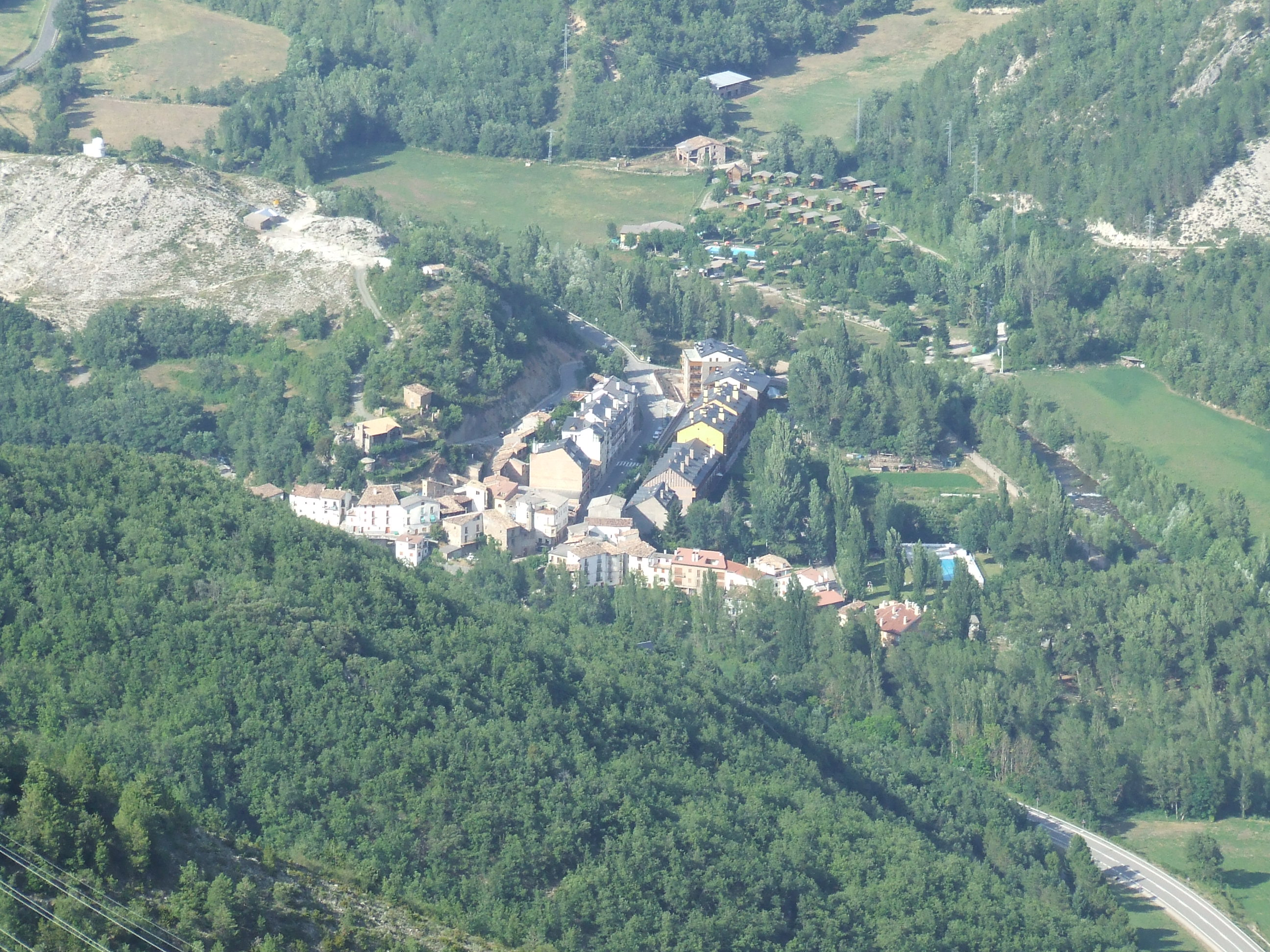 Vista de Senterada des de Burguet (Pallars Jussà)